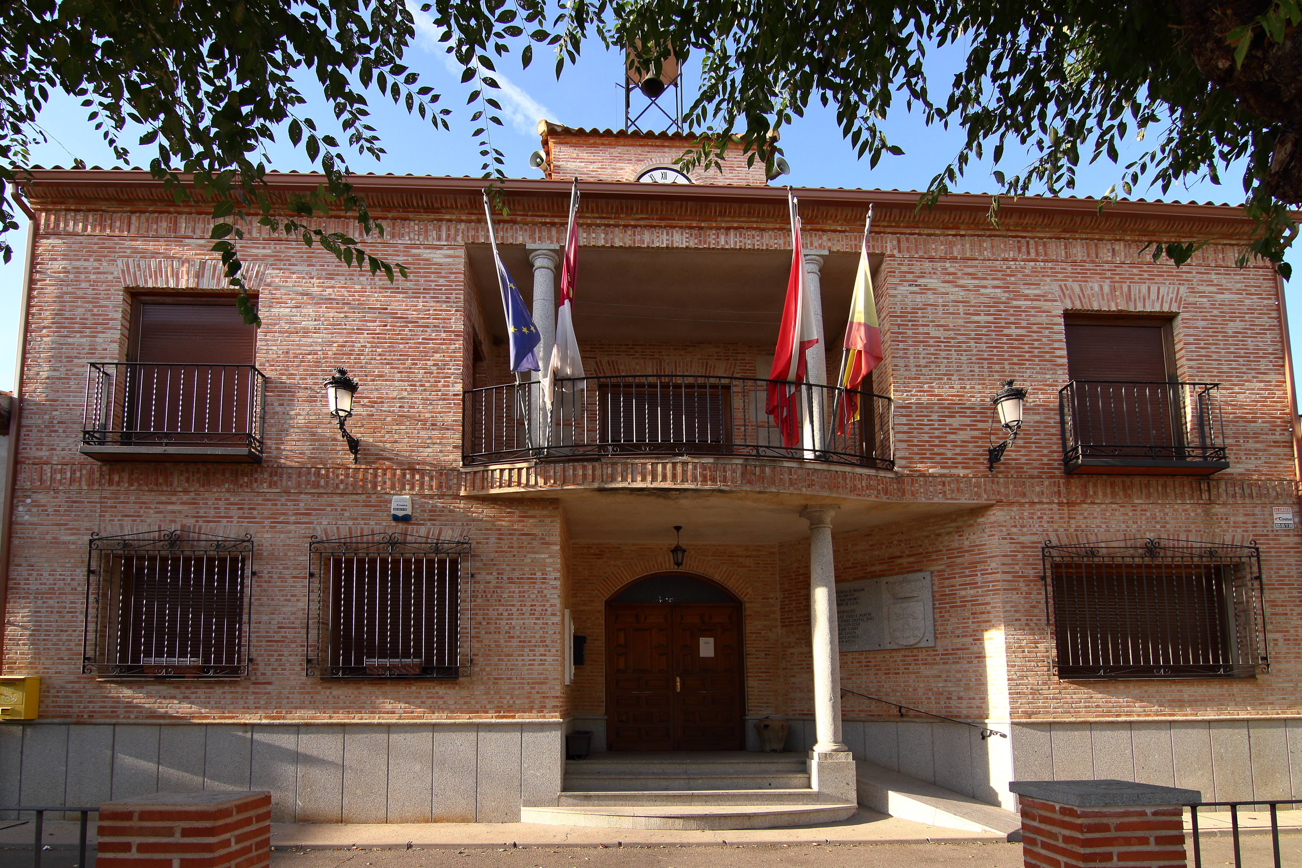 Ayuntamiento de Villamiel de Toledo